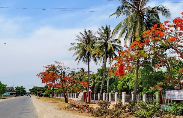 Ven đường Nha Hố